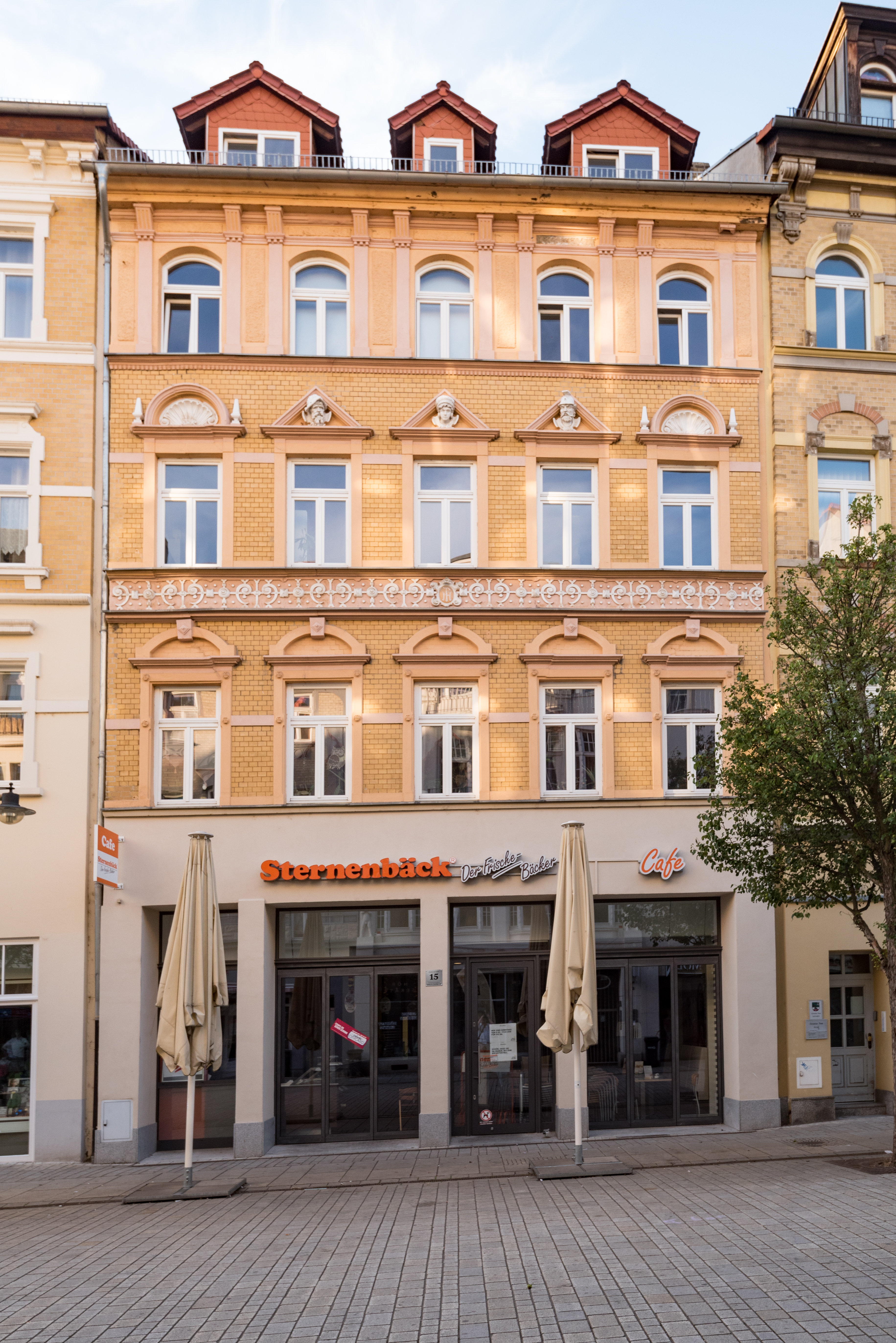 Weißenfels, Jüdenstraße 15